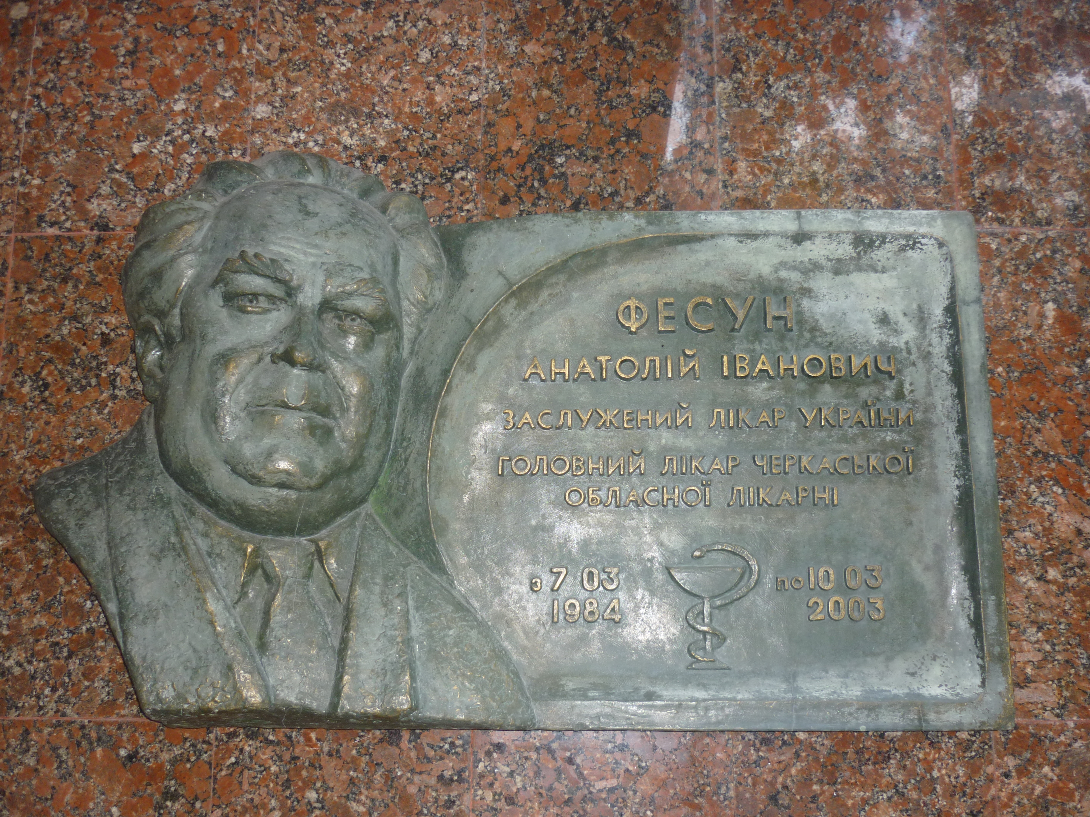 Пам'ятна дошка на фасаді Черкаської обласної лікарні на честь Фесуна А.І., головного лікаря в 1984-2003 роках